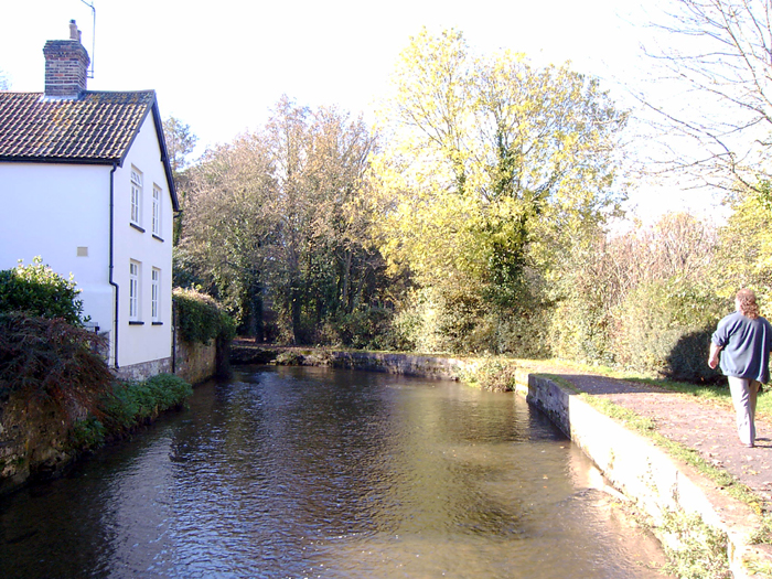 River Frome, Dorchester.